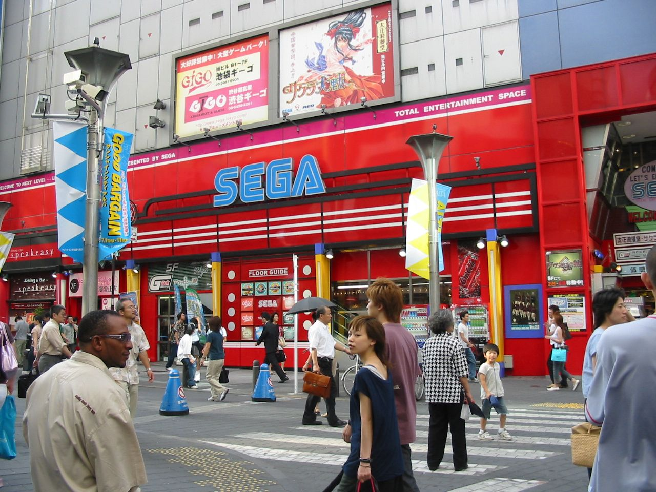 Sega center at Ikebukuro, Tokyo